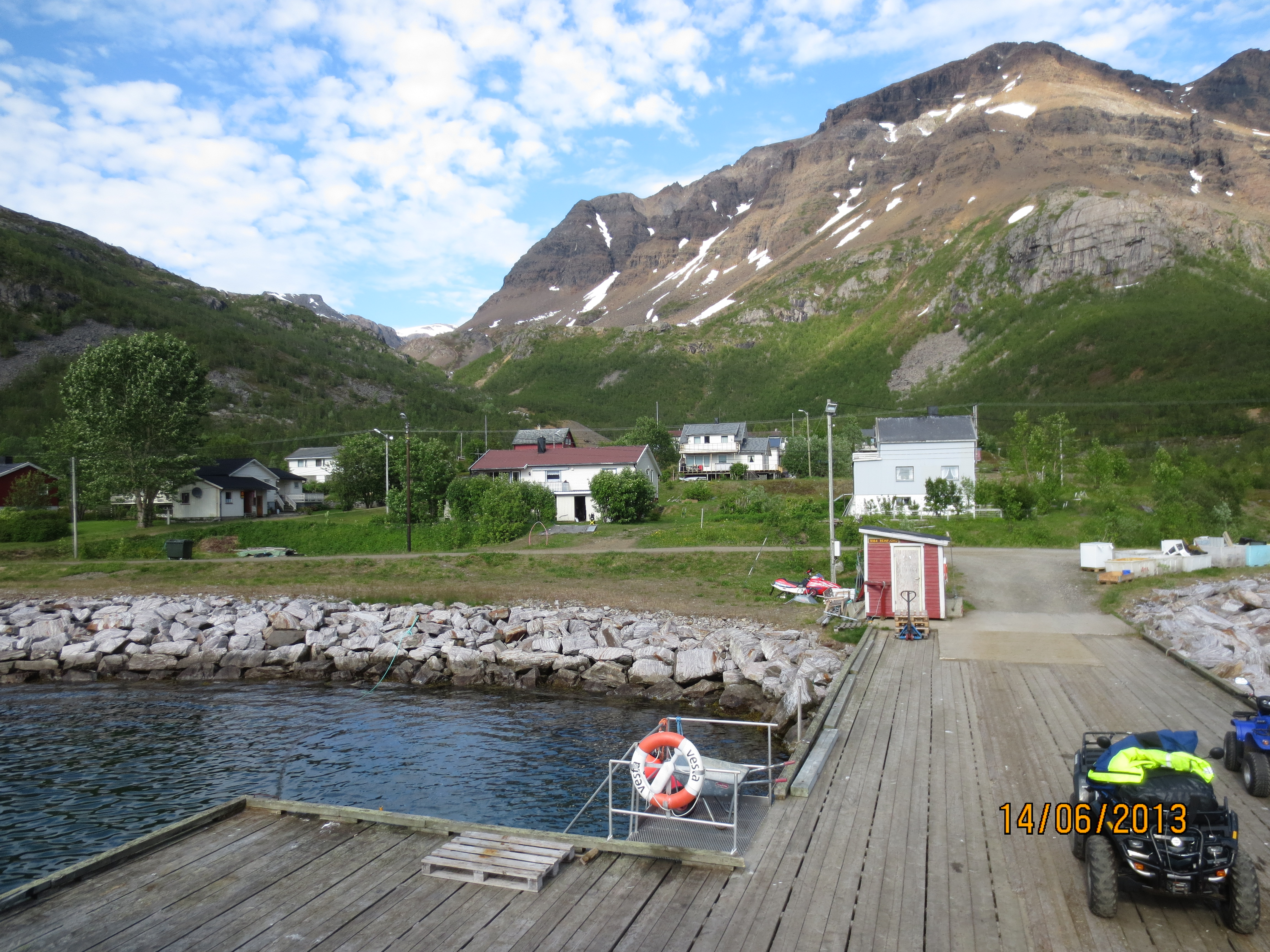 Reinfjord. Veglaus bygd i Kvænangen kommune